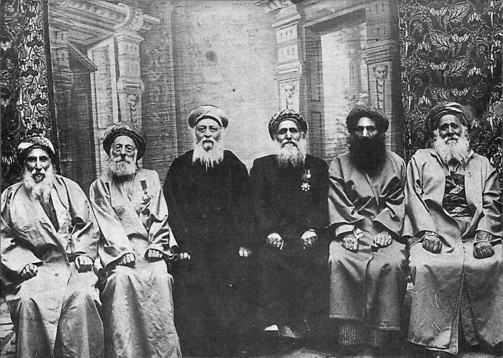 חכמי ורבני עיראק. מימין לשמאל הרבנים: משה שמש, יחזקאל הלוי, יצחק אברהם שלמה, דוד פאפו, ששון הלוי ואברהם הלל